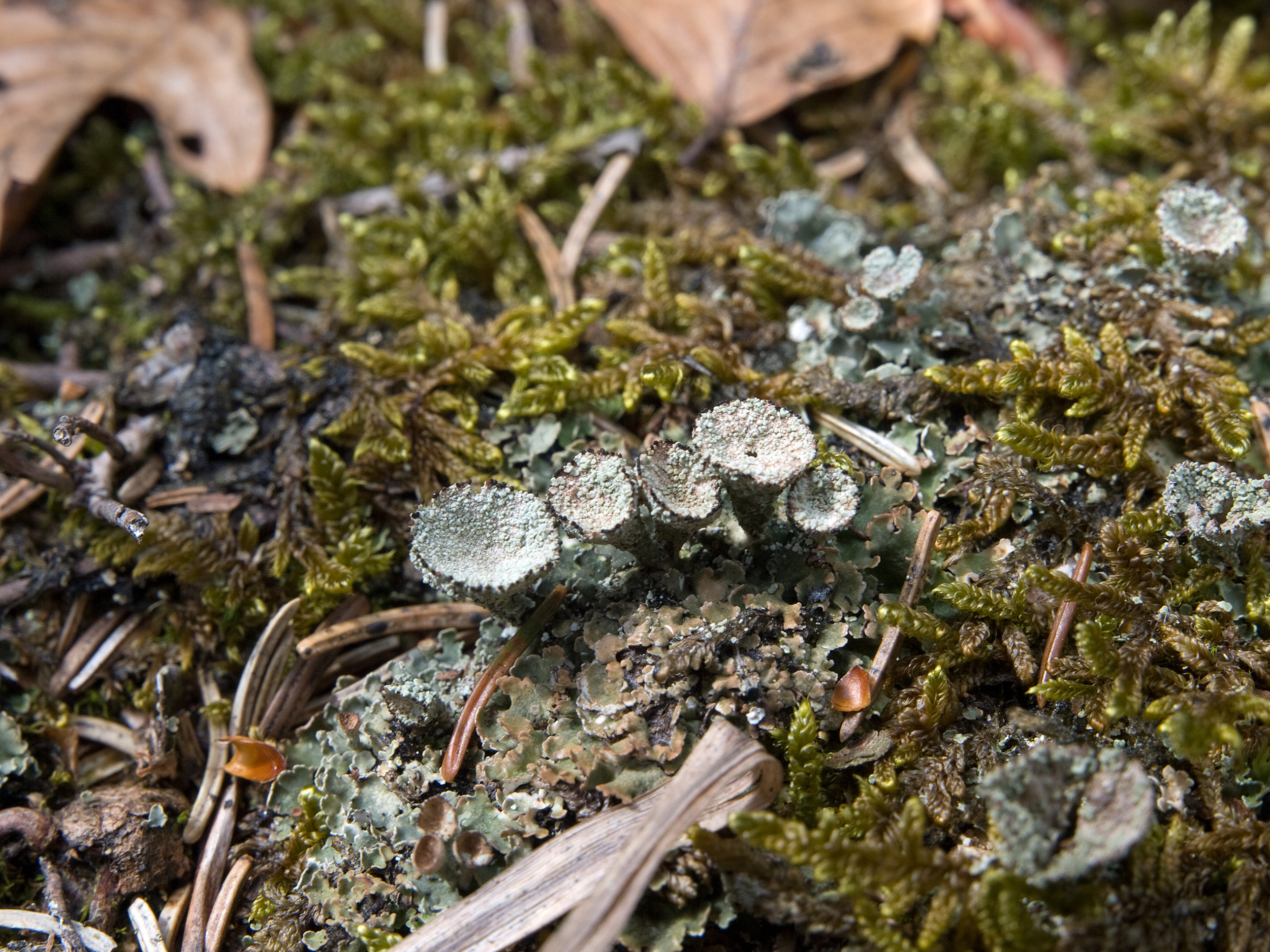 Cladonia pyxidata Picture taken in Berchtesgaden/Bavaria